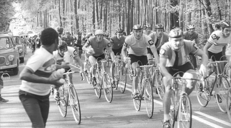 Friedensfahrt, Fahrerfeld ADN-ZB Reiche 19.5.77 Mlada Boleslav : 30.Internationale Friedensfahrt 10. Etappe von Dresden nach Mlada Boleslav (18.5.77)-Alle Blicke richteten sich auf die Mannschaftsbereuer. Am offiziellen Verpflegungsabschnitt zwischen Kilometer 115 und 123 werden den Fahren Getränke überreicht. In der ersten Reihe von rechts zu erkennen: Nr. 40 Istvan Sliposevios (UVR), Nr. 20 Jiri Bartolsic (CSSR), Nr. 95 Alexander Awerin (UdSSR), NR. 56 Karl -Dietrich-Diers (DDR) und der Kubaner Lazaro Santos.